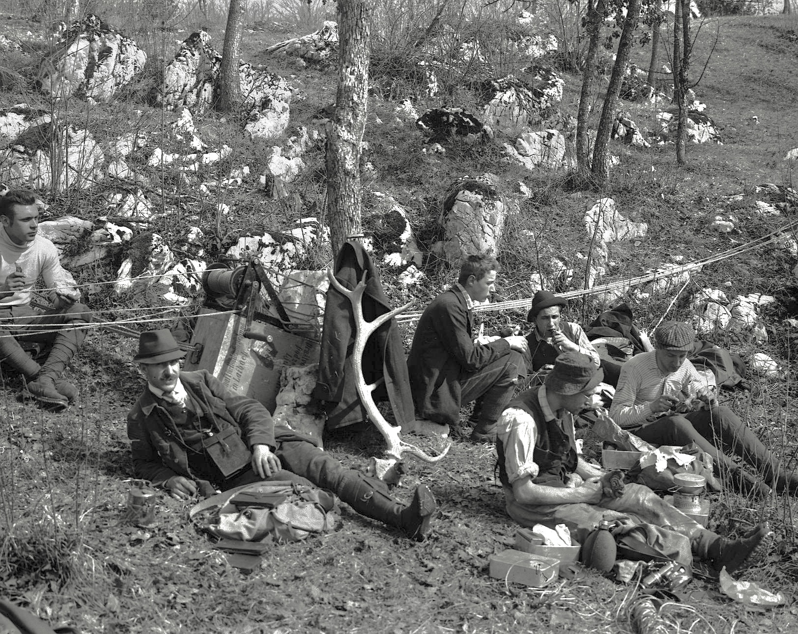 Drenovci - skupina pred breznom z vitlom.